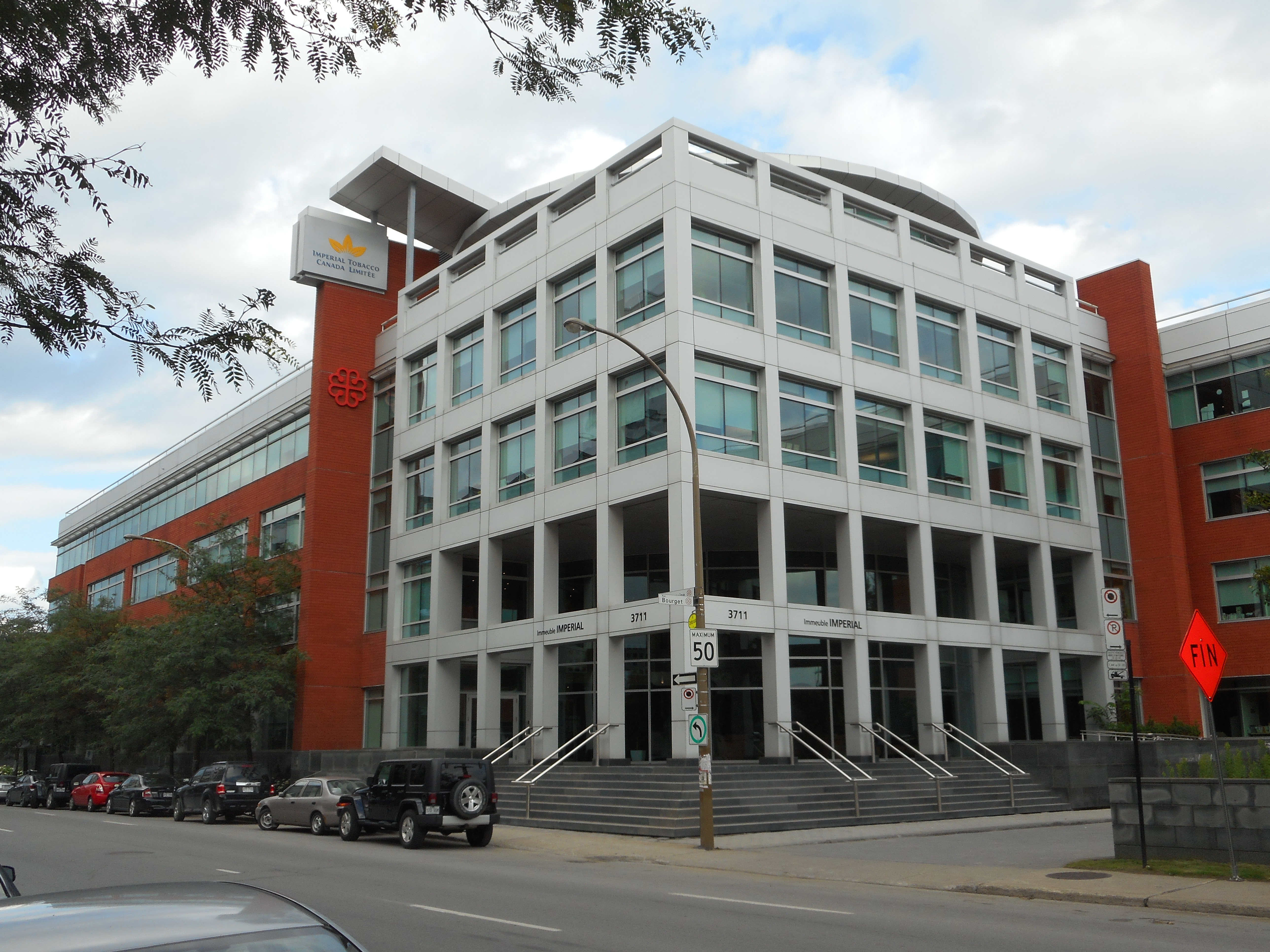 Imperial Tobacco Canada Limitée, Siège Social, 3711, rue Saint-Antoine Ouest, Montréal